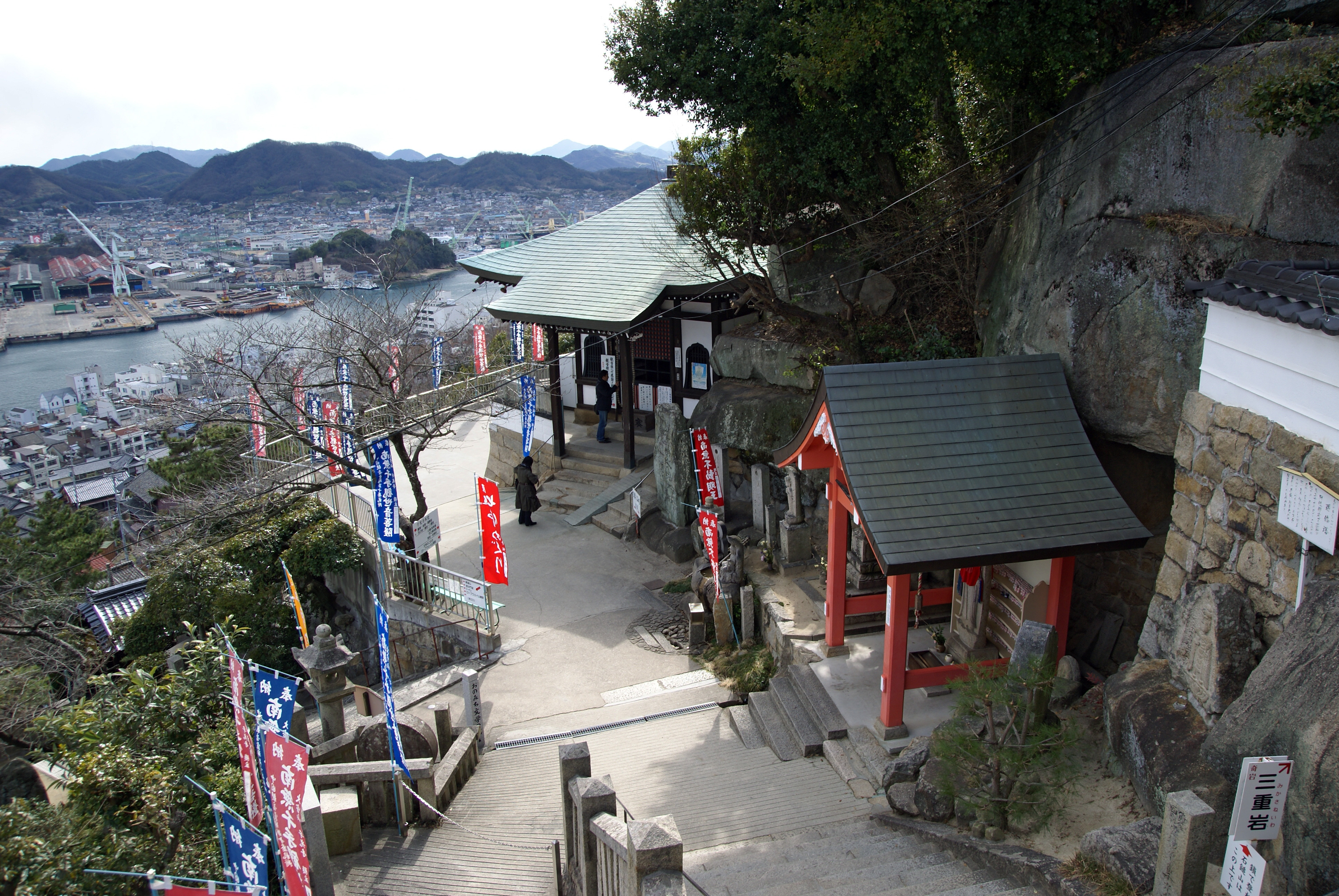 Senkoji in Onomichi, Hiroshima prefecture, Japan